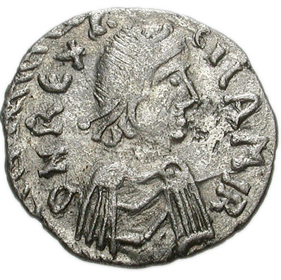 Münze: 50 Denari Silber, Gelimer, König der Vandalen, um 530, Münzstätte Karthago, Beschriftung: D N REX G-EILAMIR